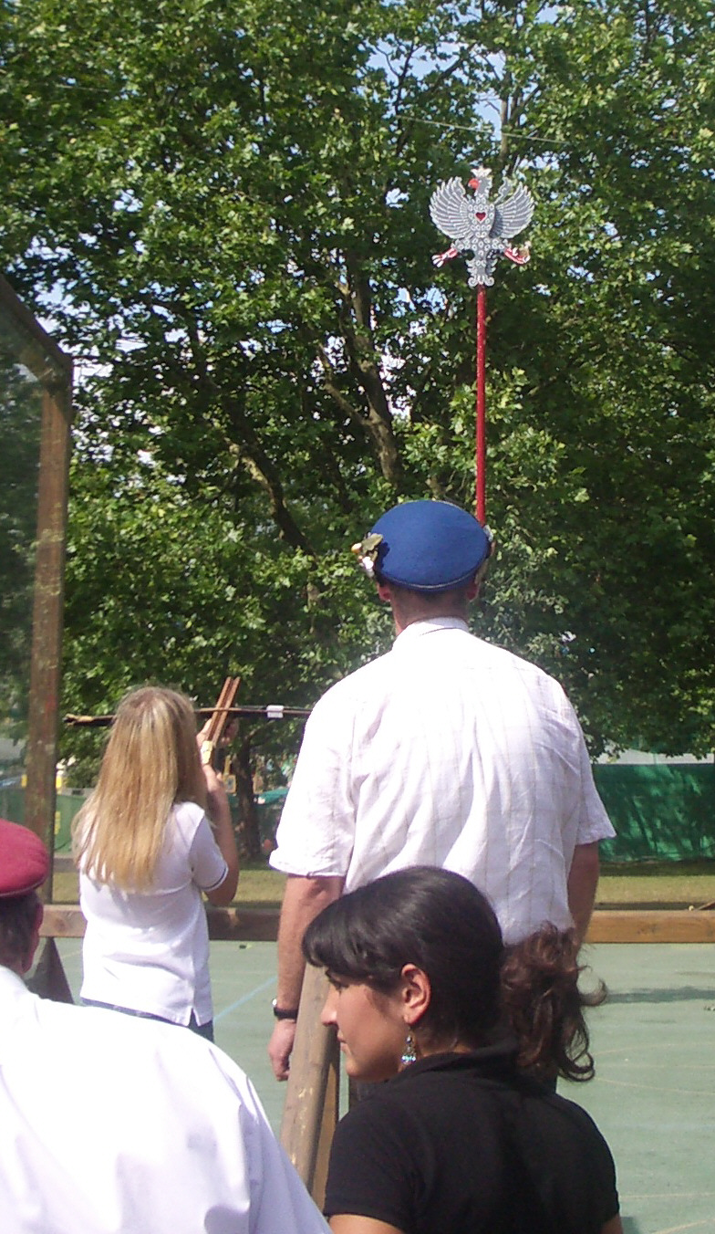 Ravensburg, Germany: Rutenfest, Adlerschießen der Mädchen (Rutendienstag)